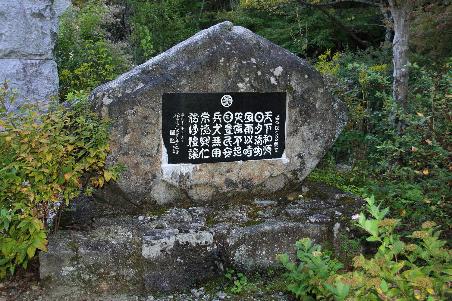 松平郷園地にある祝聖文碑（豊田市松平町、2009年（平成21年）9月）